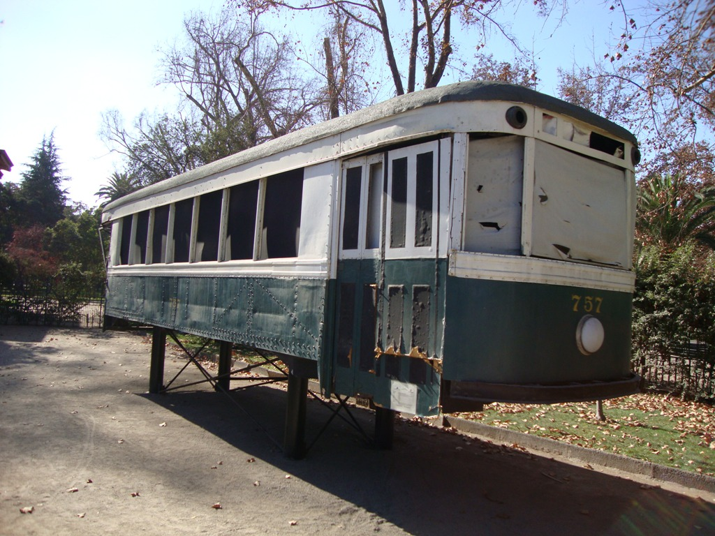 Tranvía Brill Seven Windows serie 757 fabricado en Philadelphia, Estados Unidos, en 1931. Tracción eléctrica con trocha de 1435 mm, operando en Santiago de Chile hasta 1960-1970. Actualmente exhibido en el museo Ferroviario de Santiago.